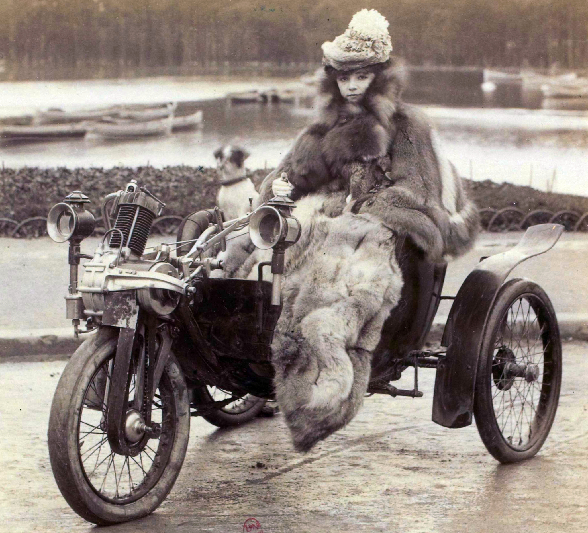 [Collection Jules Beau. Photographie sportive] : T. 12. Années 1899 et 1900 / Jules Beau : F. 39v. [Sur la côte de Saint-Barbe, Gaillon, 11 novembre 1900] (cutted version)